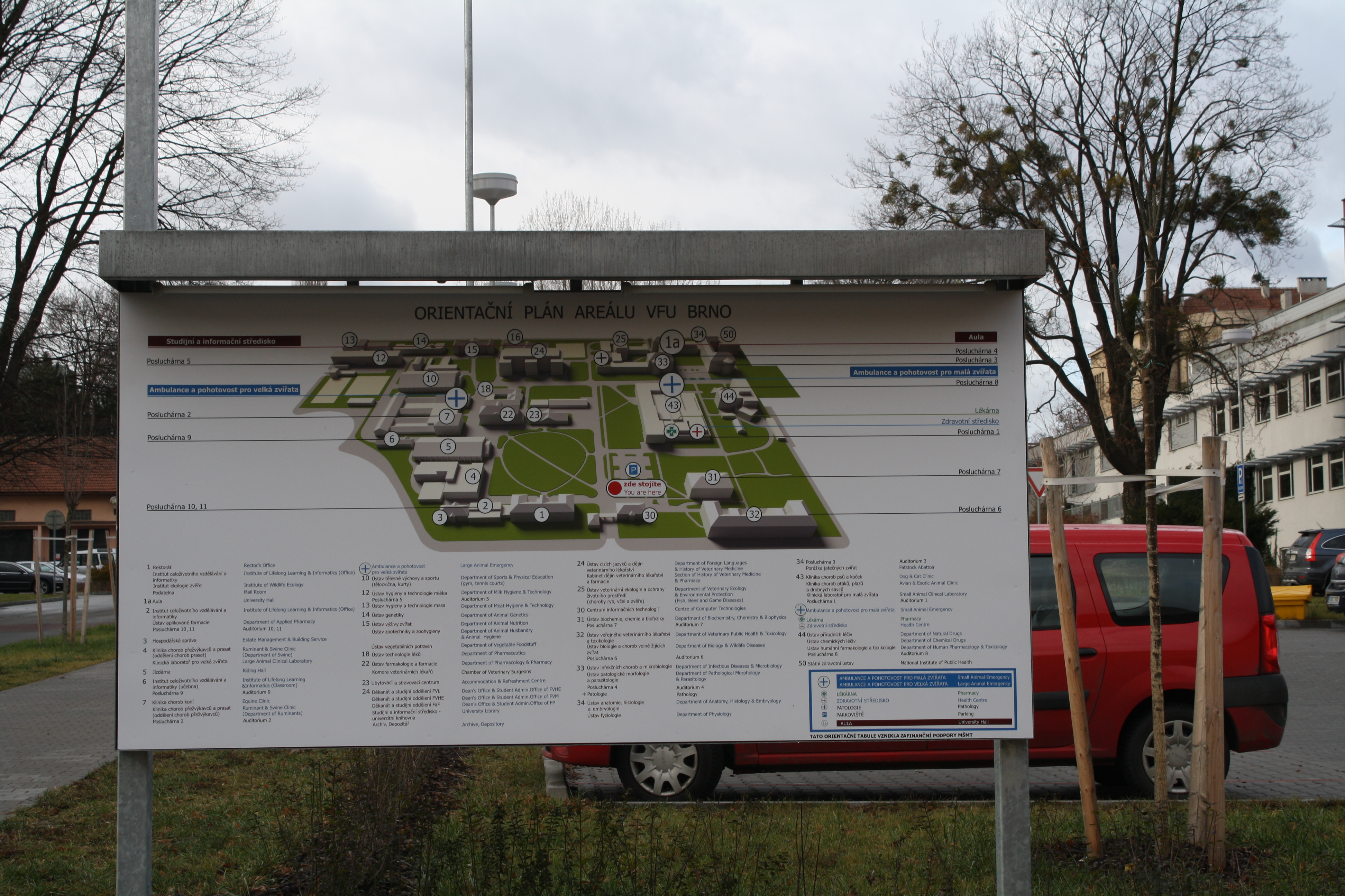 Informační tabule s plánkem VFU